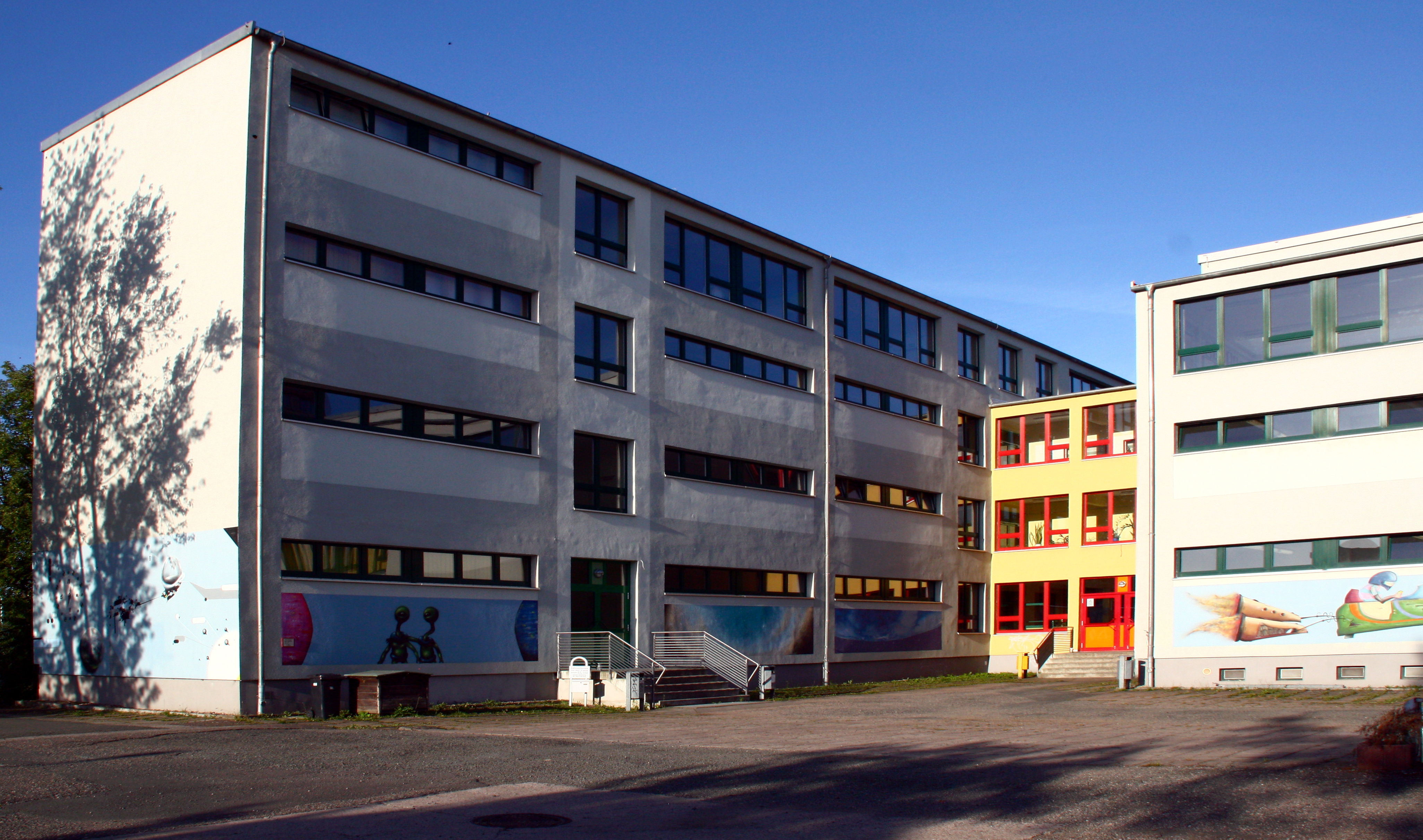 Sicht von Nordosten auf den Südtrakt, Ansicht beschnitten, Farbe aufgehellt.